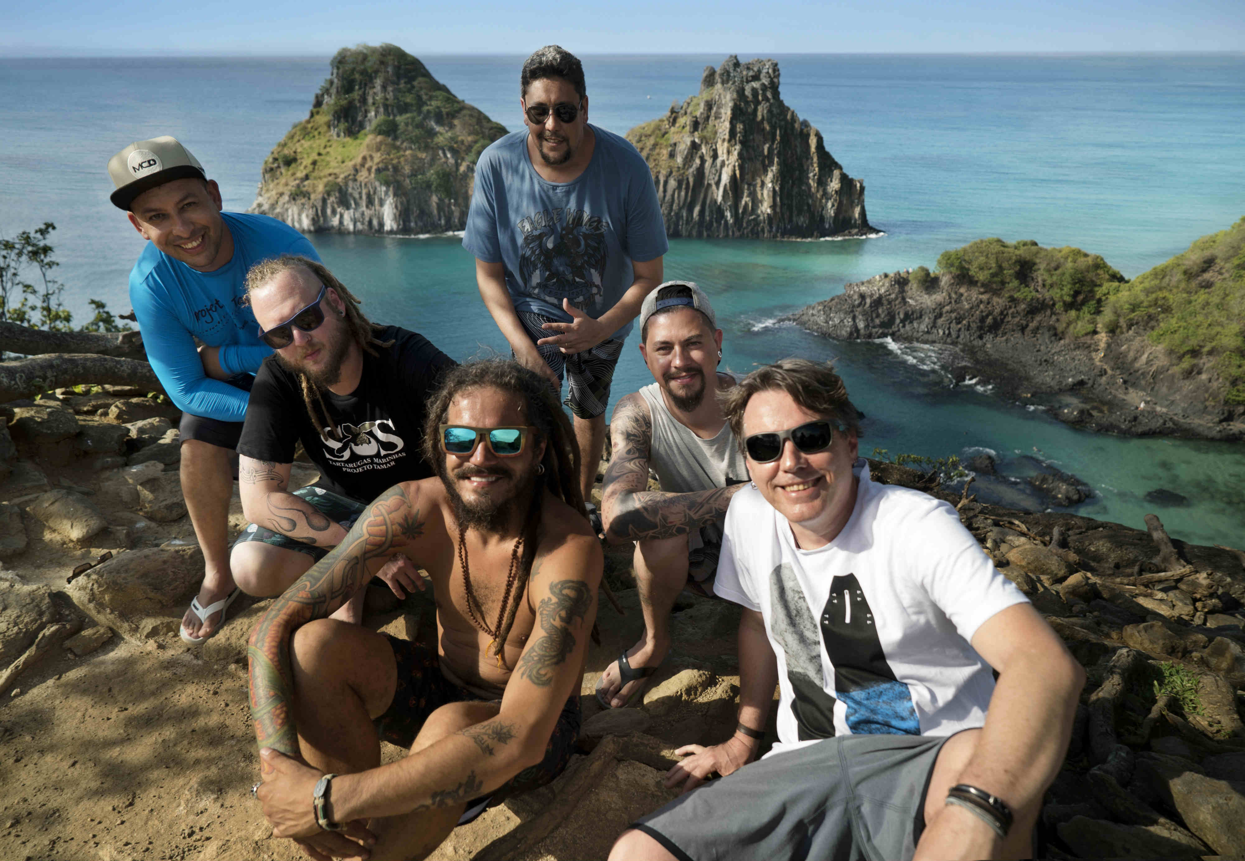 Foto da banda Maskavo na Ilha de Fernando de Noronha durante as gravações do clipe da faixa O Mar Pro Sonhador, clique de Heron Domingues.